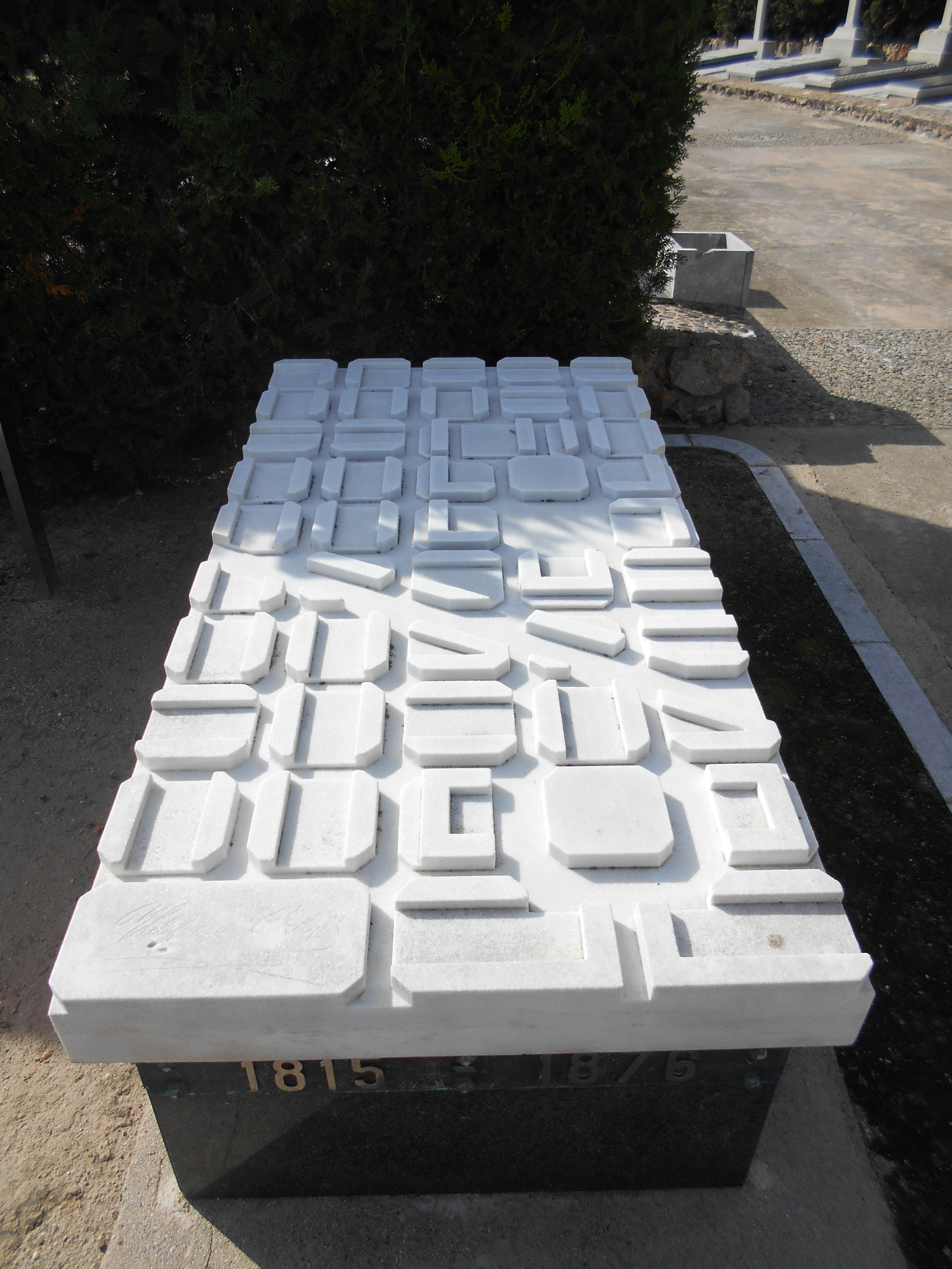 Sepultura de Ildefons Cerdà, cementerio de Montjuïc.